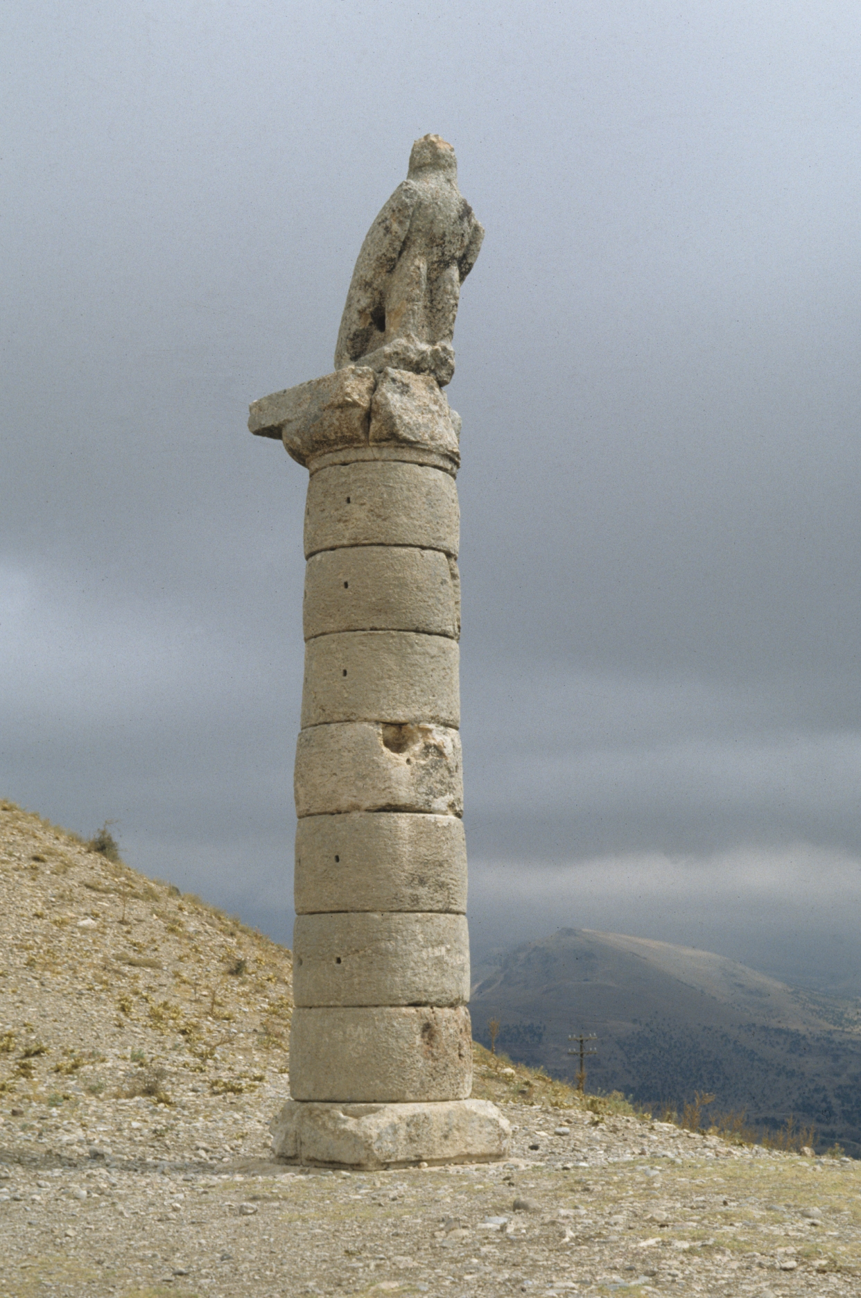 Grabhügel Karakus in Kommagene, Zentralanatolien, Südsäule mit Adlerskulptur